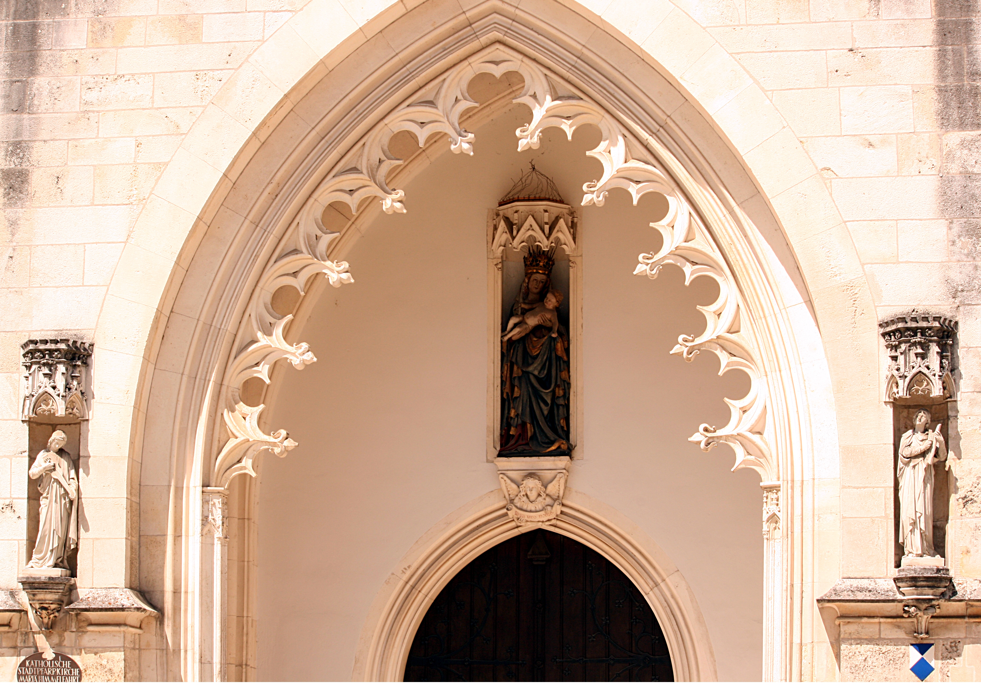 Kelheim - Kirche_Mariä_Himmelfahrt_Detail